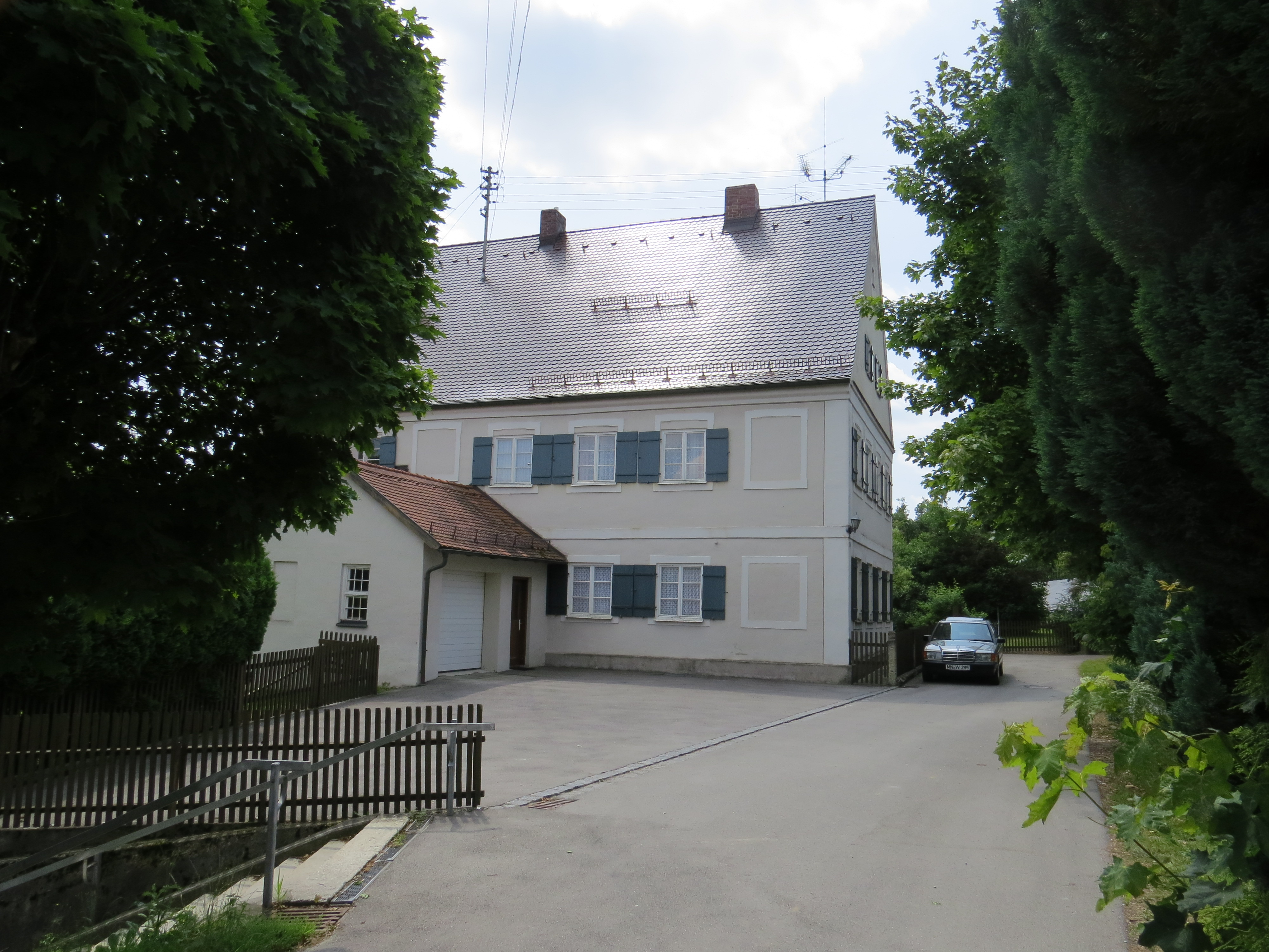 Pfarrhaus in Mittelneufnach